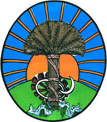 Escudo del partido de General Villegas, provincia de Buenos Aires, Argentina.